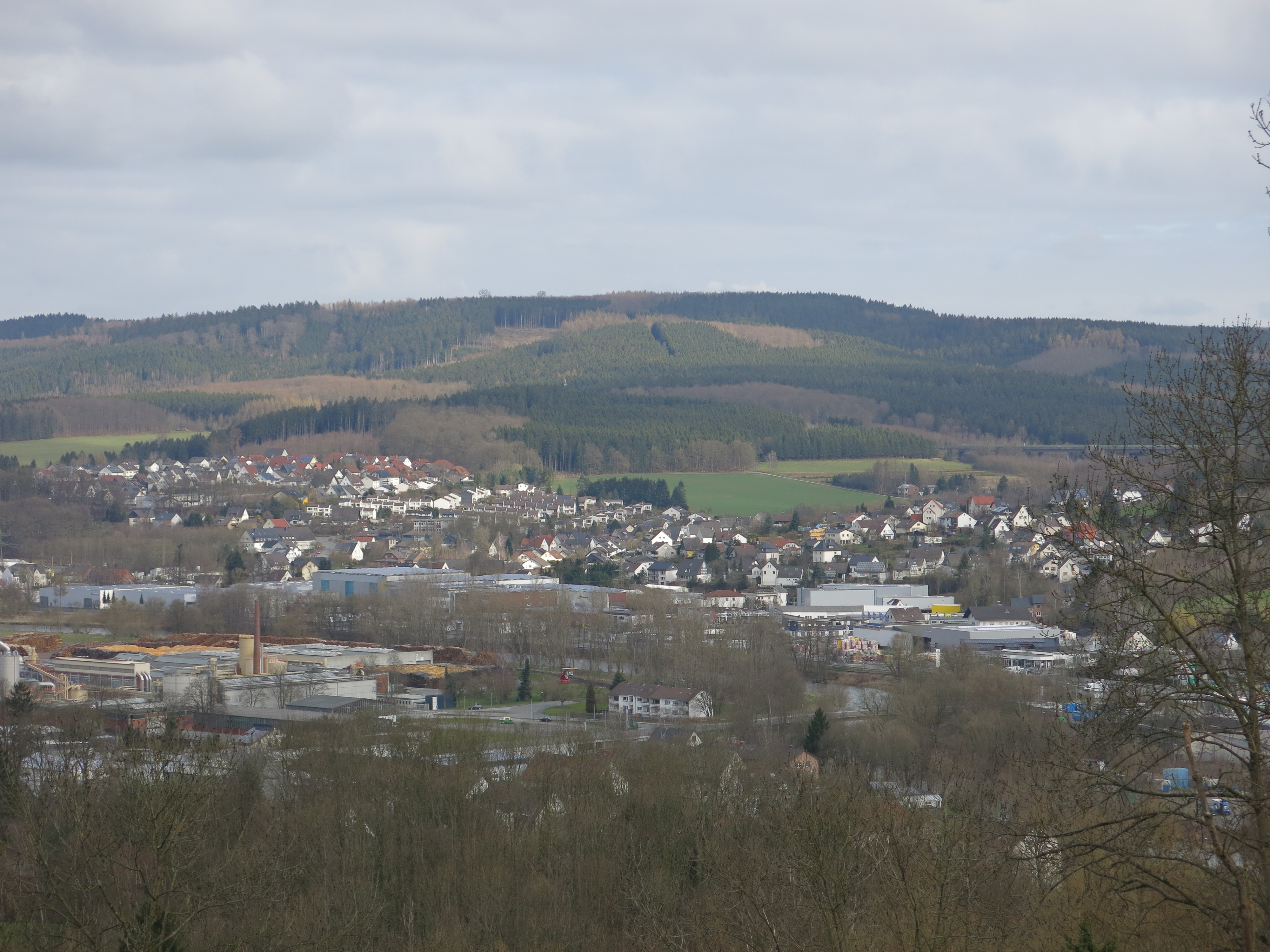 Der Lemmberg im Arnsberger Wald von Süden. Davor der Ortsteil Niedereimer von Arnsberg. Davor Teile des Gewerbegebietes Dieselstraße und die Ruhr. Diesseits des Flusses Teile des Gewerbegebietes Hammerweide. Die Aufnahmen entstanden auf der Alten Burg.